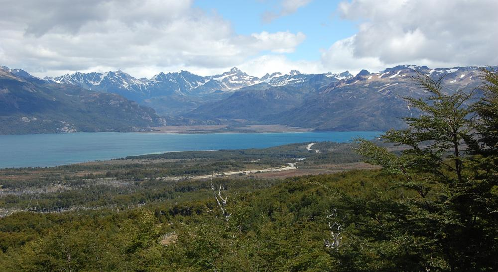 Vista del Lago Fagnano, desde norte a sur, en la porción Chilena del Lago.